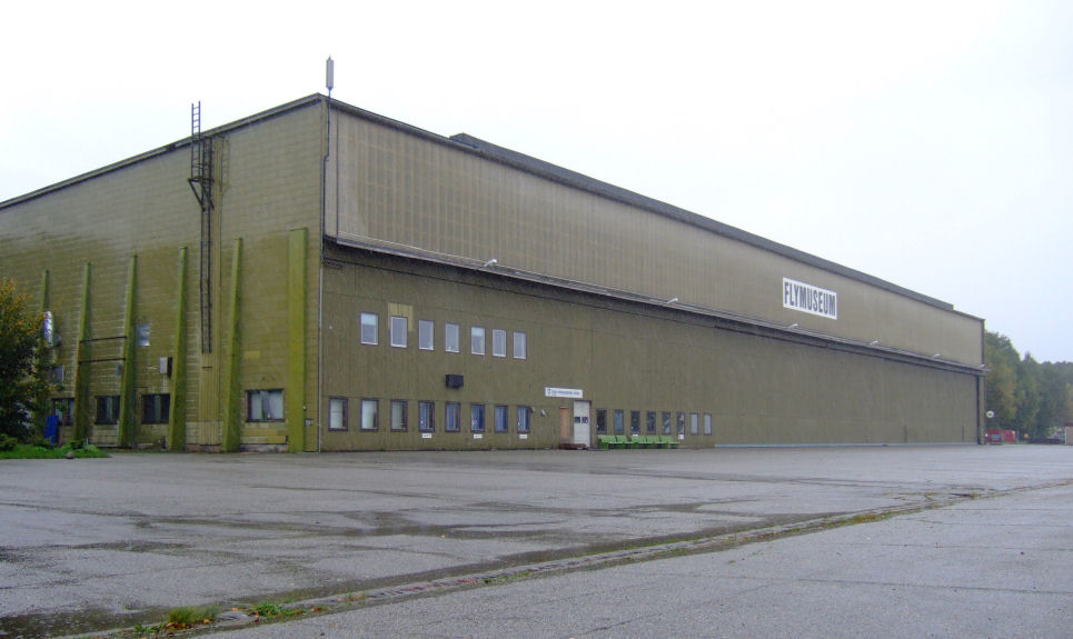 Sola Airplane museum